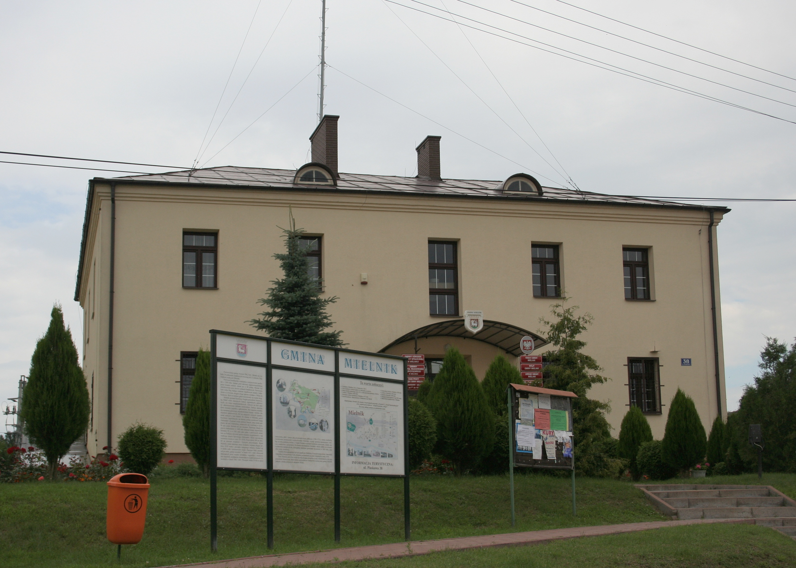 Mielnik, woj. podlaskie – budynek urzędu gminy.